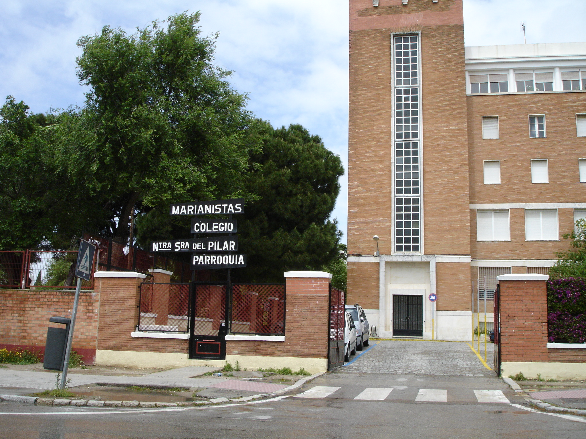 Colegio Marianista de Jerez, Jerez (Spain)